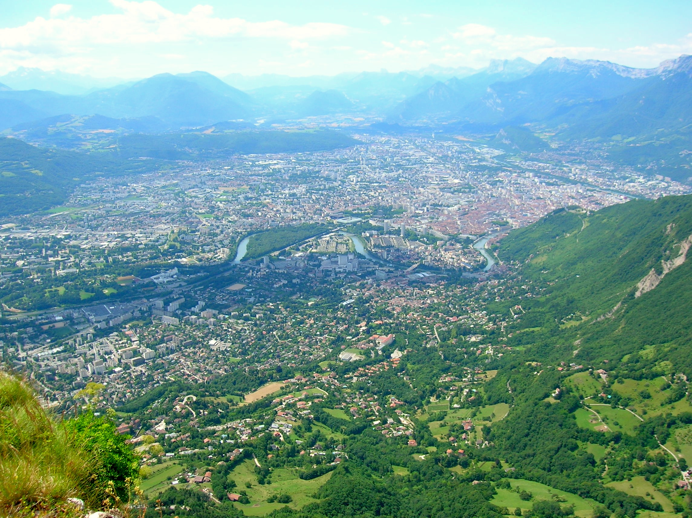 Vue générale de l'agglomeration grenoblois depuis le Fort St Eynard, Le Sappey-en-Chartreuse, Isère, France. Corenc, Meylan, La Tronche, Grenoble, Gières, Saint-Martin d'Hères, etc.